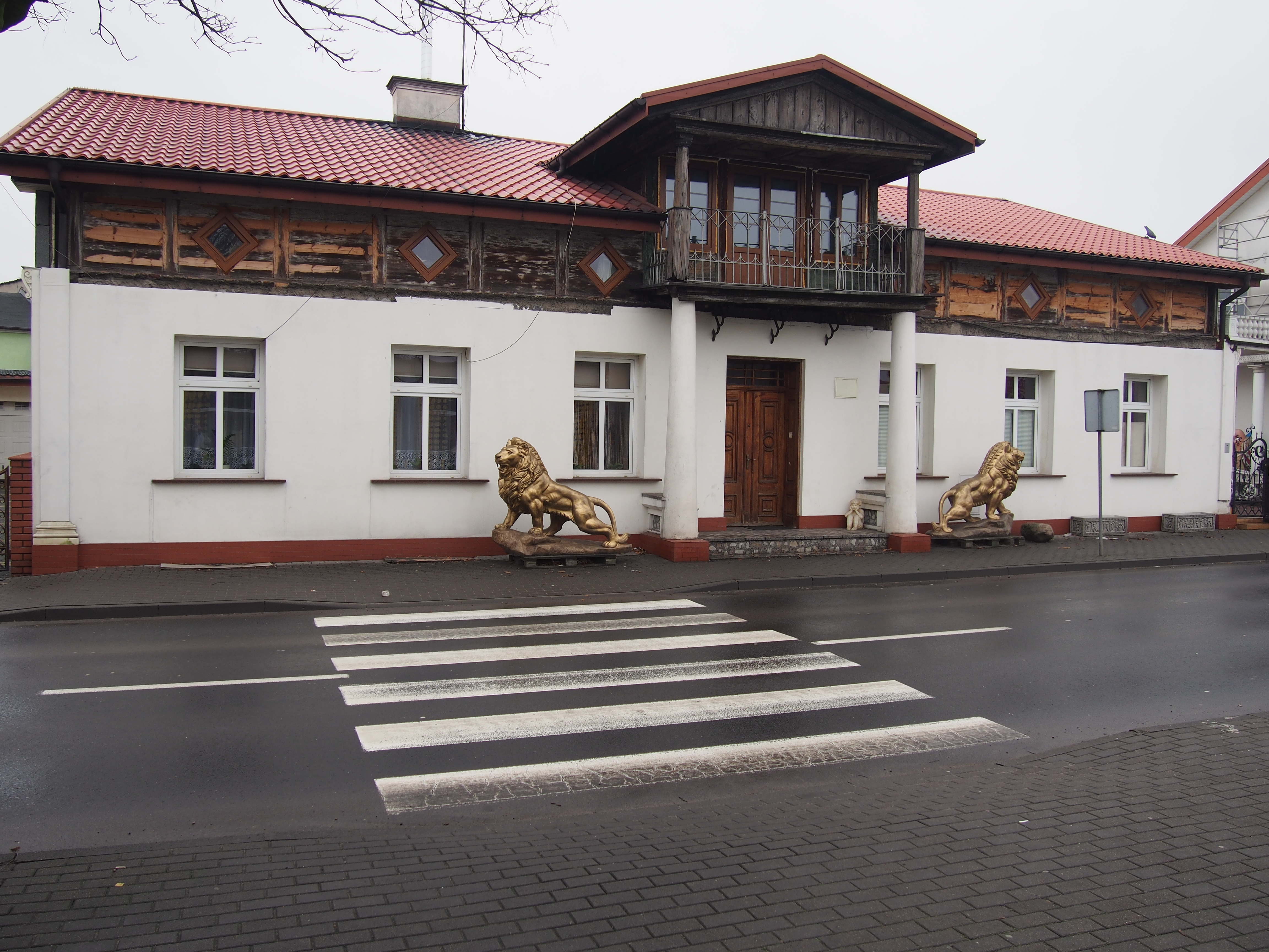 ul. Kościuszki 4 w Słupcy.